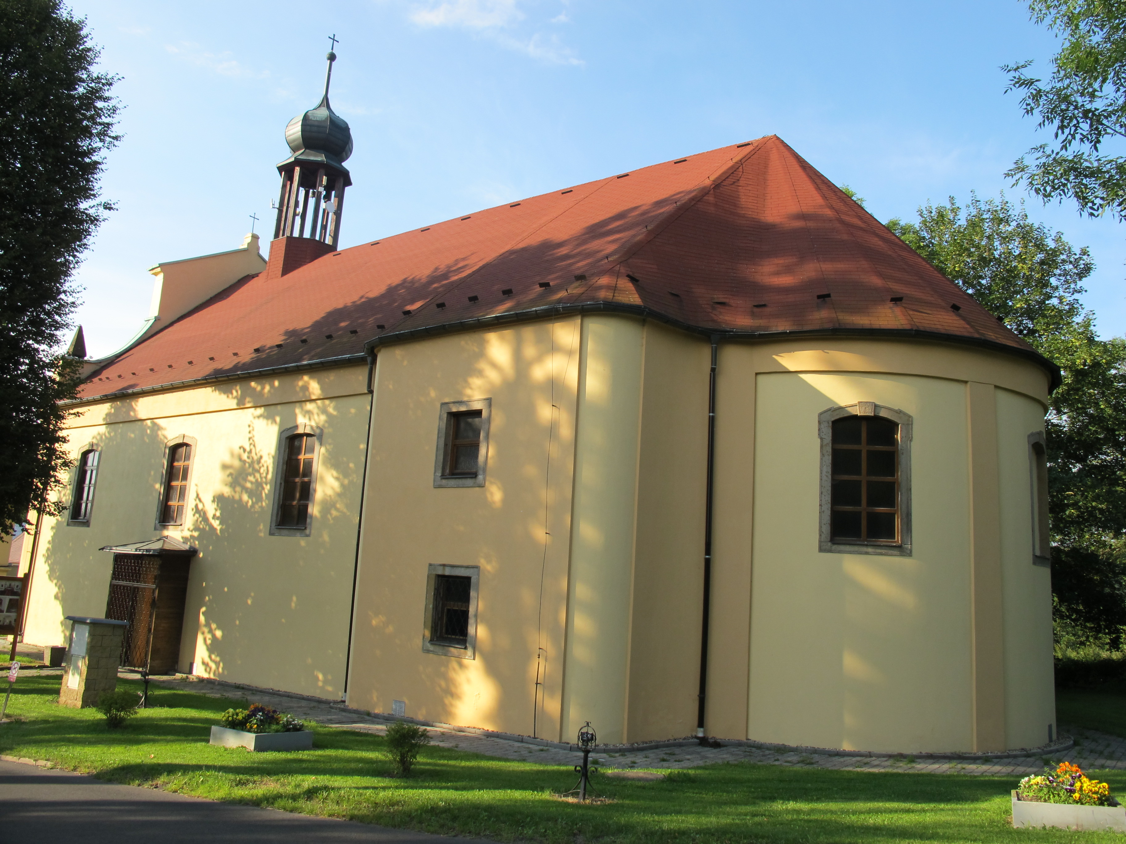 Kostel svatého Michaela archanděla, střed obce, Brandov.